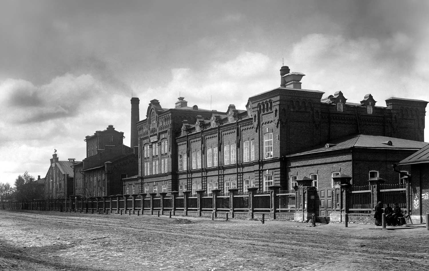 Казенный винный склад и спиртоочистительный завод. Улица Набережная (Окулова, 73). Казенный спиртоочистительный завод открылся 1 января 1895 года и по этому поводу в день Нового года в главном заводском корпусе был отслужен торжественный молебен. К февралю 1900 года рядом отстроили казенный винный склад. Комплекс является памятником архитектуры регионального значения.